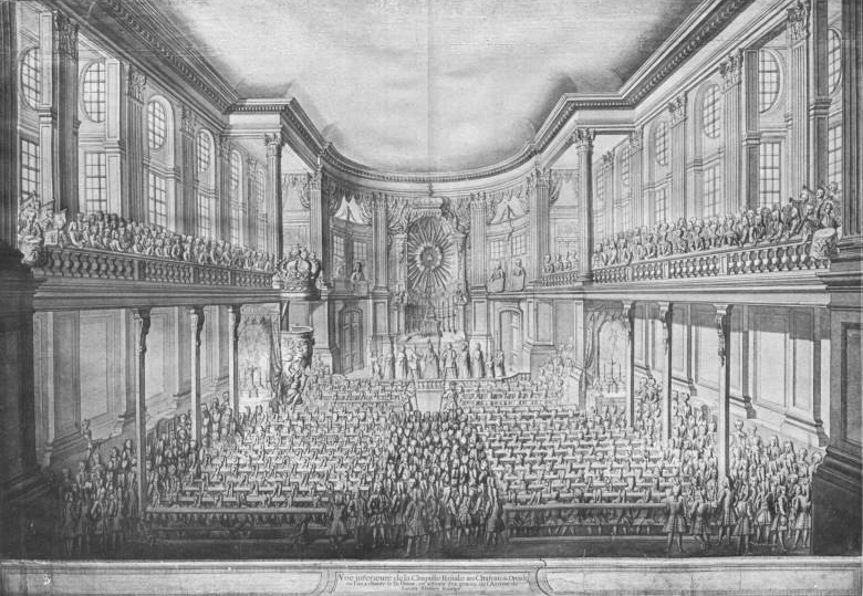 Dresden, das Innere der Hofkapelle (ehemals Opernhaus am Taschenberg), nach einer Tuschzeichnung im königl. Kupferstichkabinett Dresden